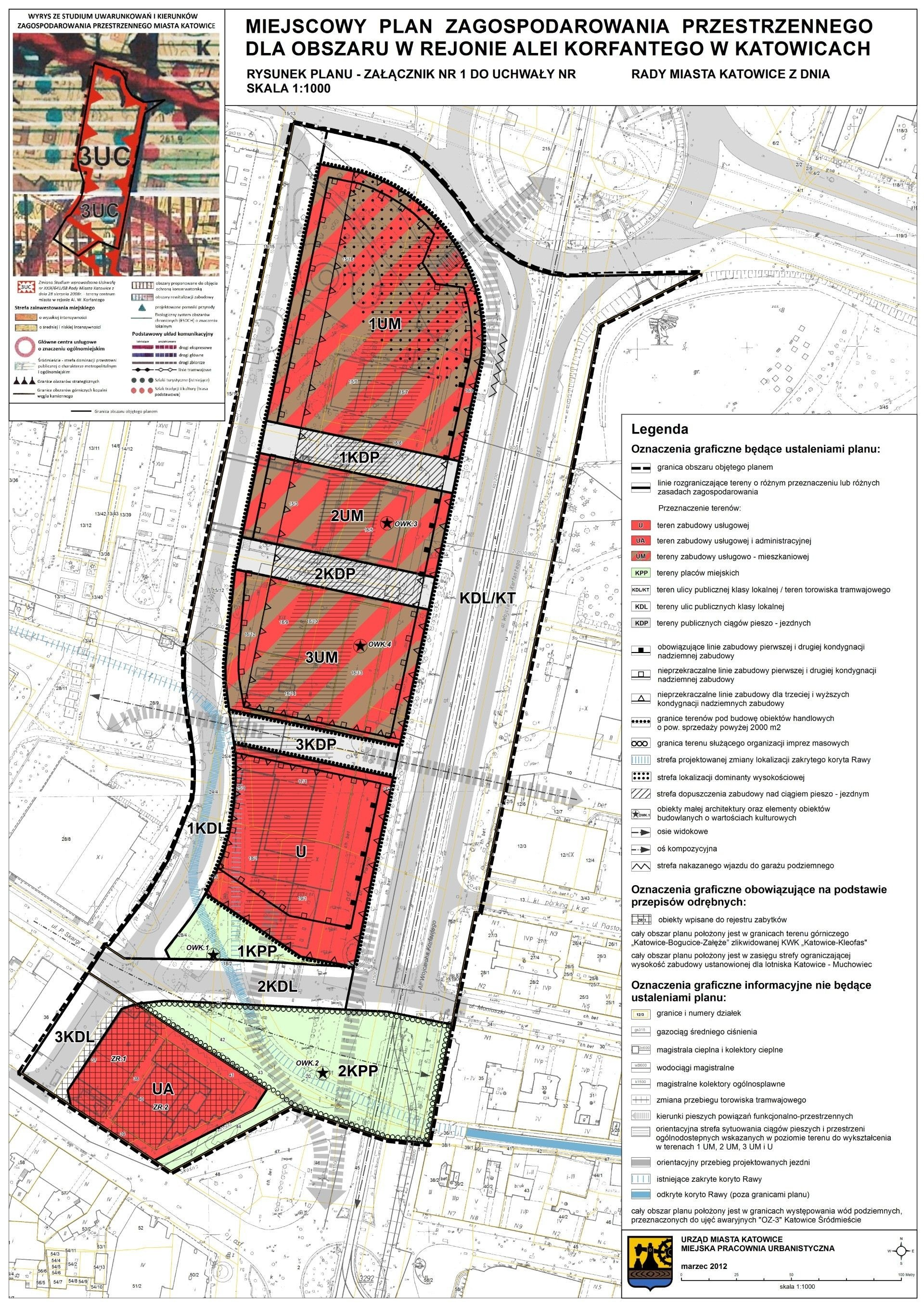 Rysunek miejscowego planu zagospodarowania przestrzennego obszaru w rejonie Alei Korfantego w Katowicach. Załącznik nr 1 do uchwały nr XX/442/12 Rady Miasta Katowice z dnia 28 marca 2012 r.